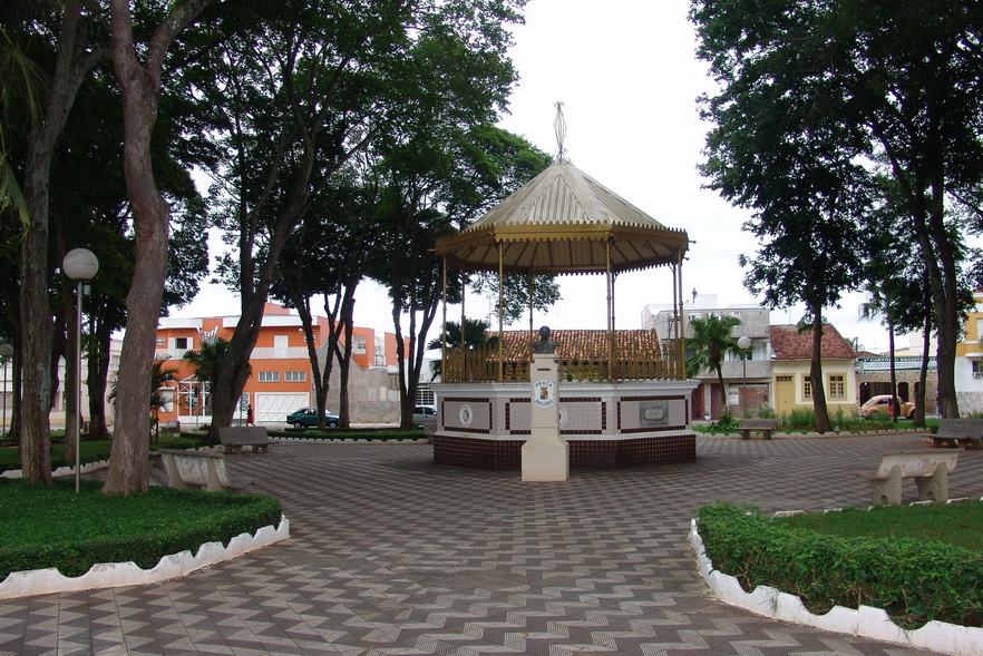 Imagem do município de Itapetininga, estado de São Paulo, Brasil.